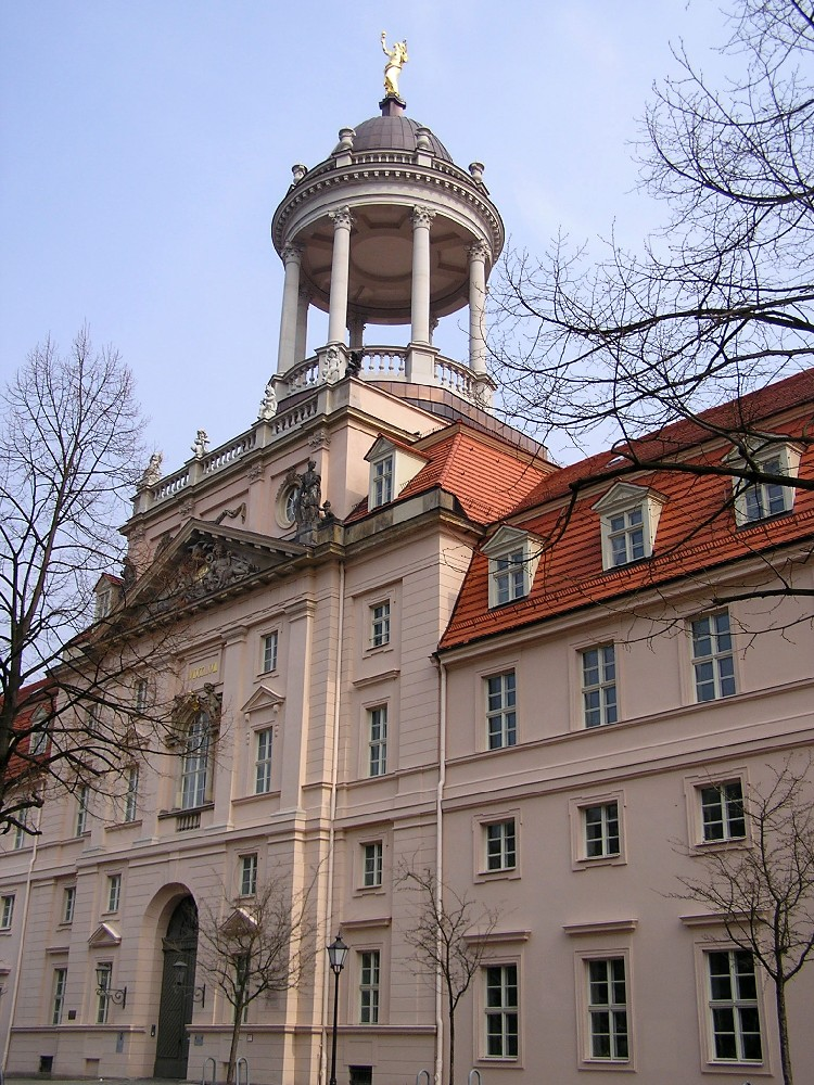 das ehemalige Große Militärwaisenhaus, Potsdam